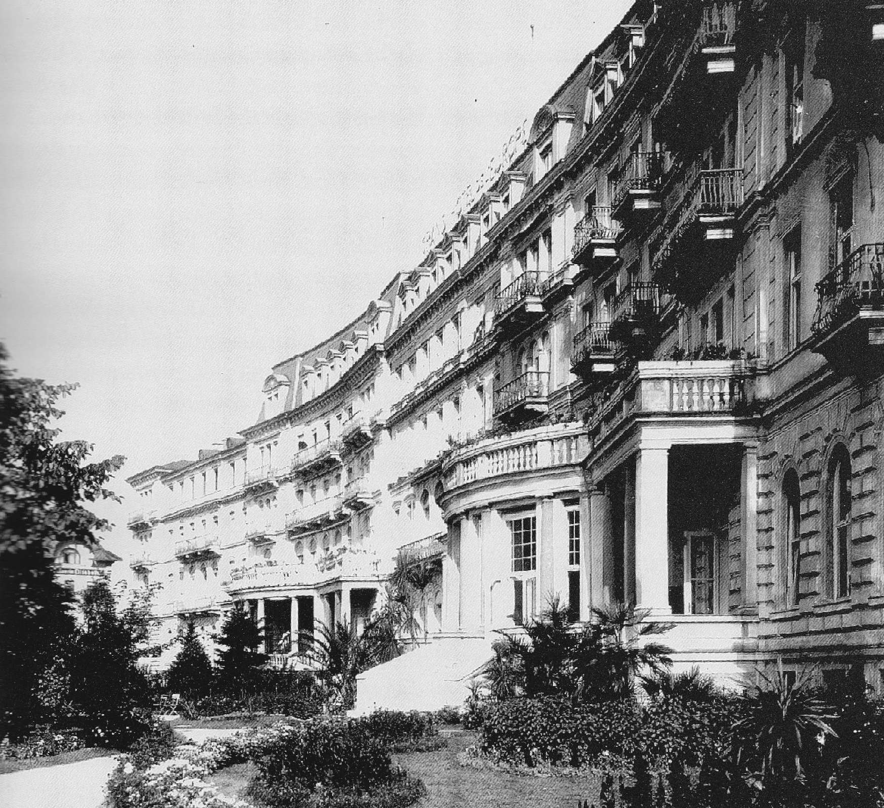 Hotel de l'Europe, auch Grand Hotel de l'Europe, Hotel Europäischer Hof, in Salzburg; Ansicht der stadtseitigen Fassade, wie sie sich zwischen 1908 und 1938 bot. - Im Bestand des Salzburg Museums.